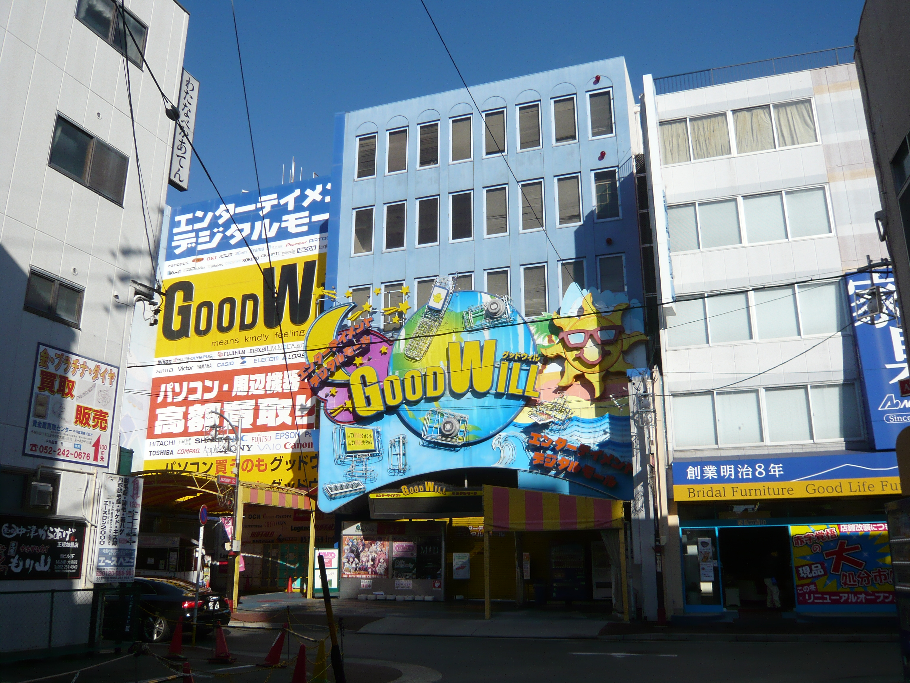 グッドウィル本店正面